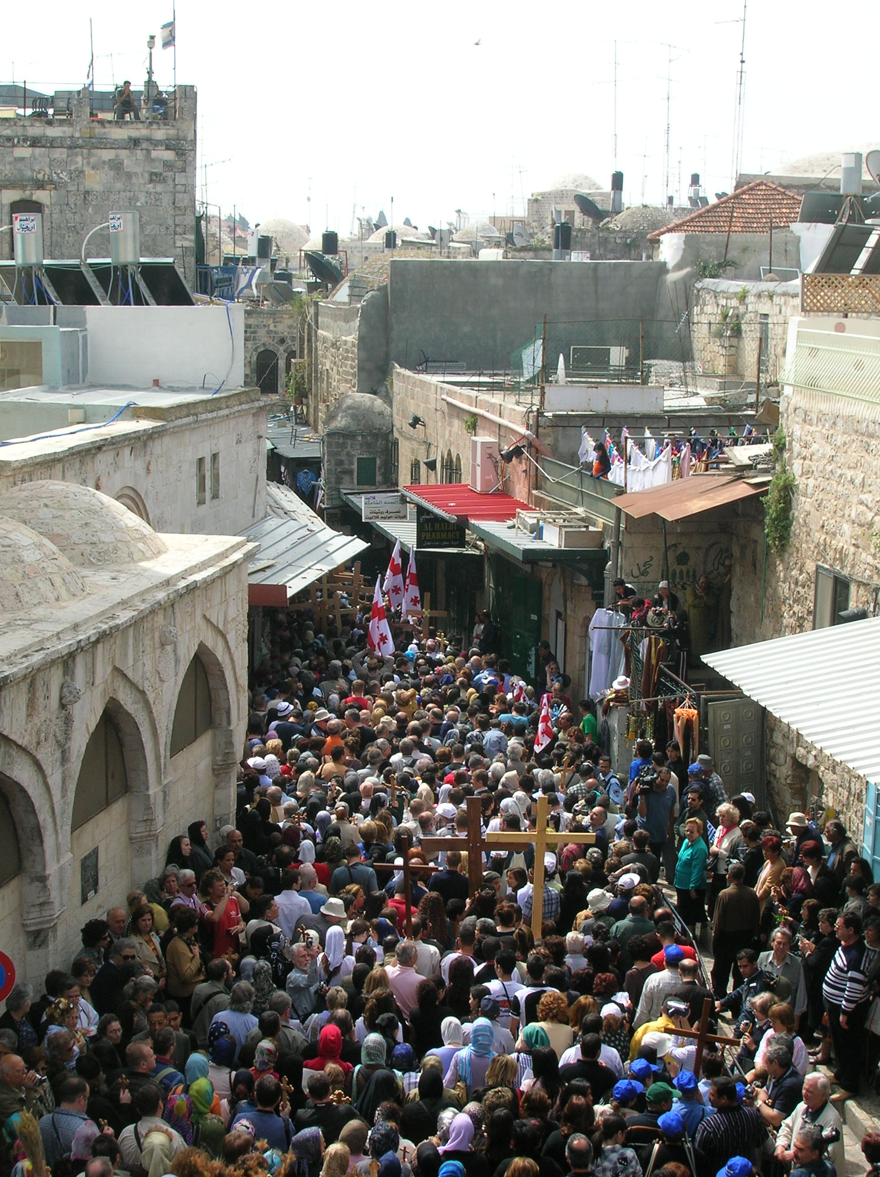 Orthodoxe Kreuzwegsprozession am Karfreitag in der Via Dolorosa, Jerusalem 2006